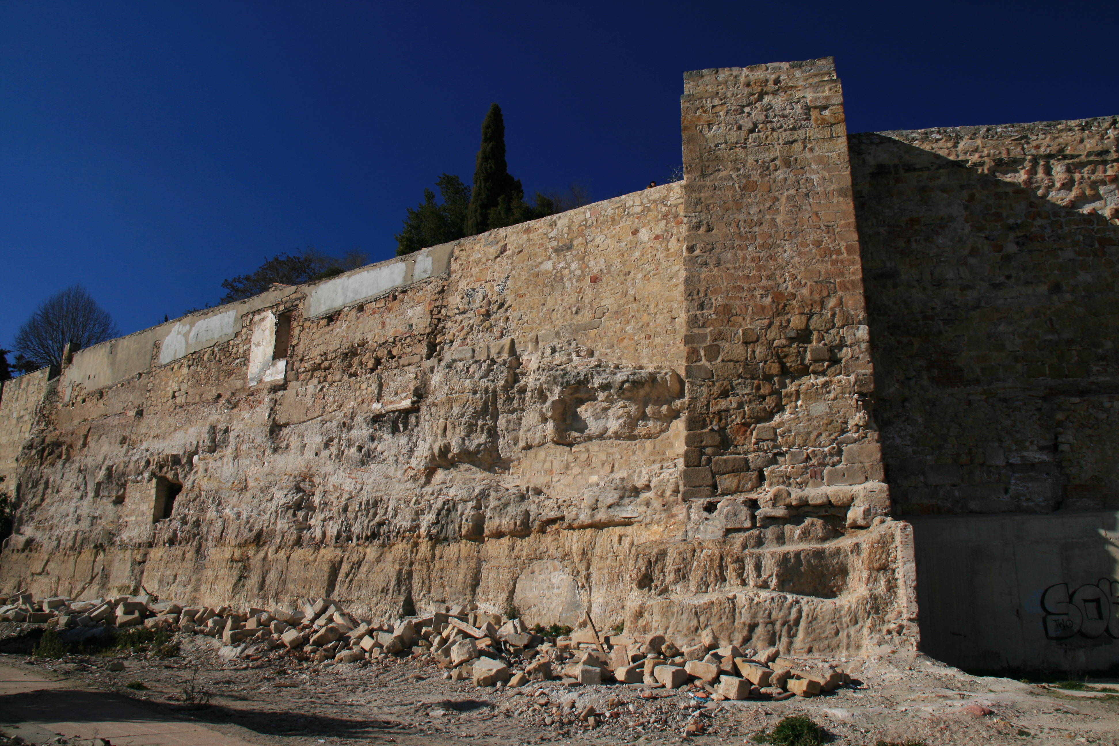 Murallas de Salamanca